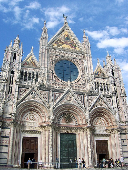 Siena - Duomo